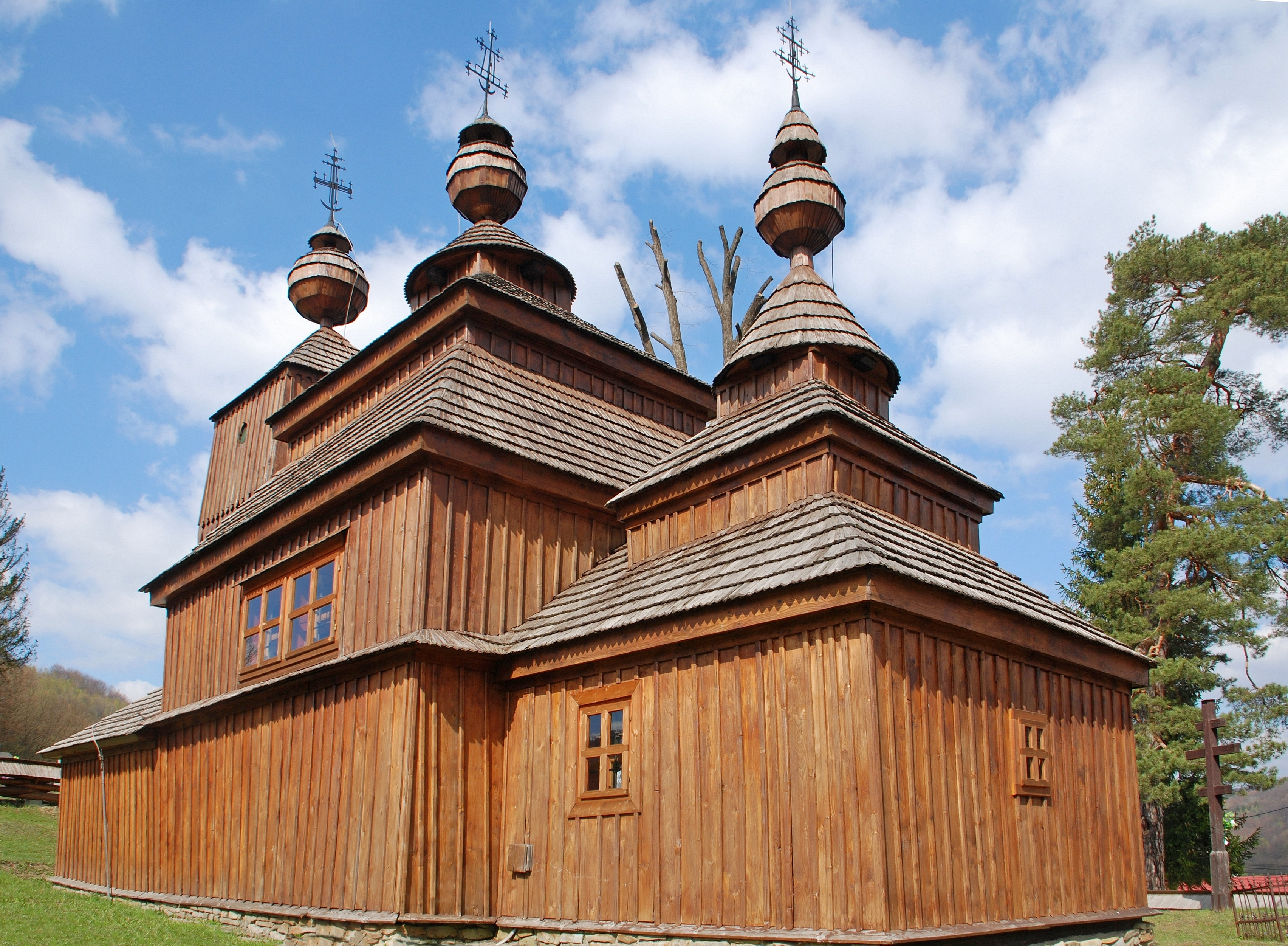 wieś Bodružal